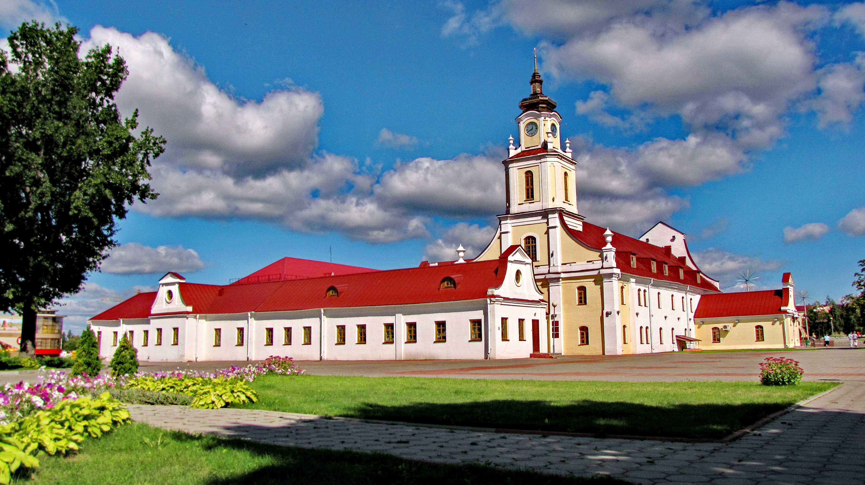 Беларуская (тарашкевіца): Комплекс былога езуіцкага калегіюму. г. Ворша This is a photo of Belarusian heritage monument. Reference number: 212Г000113 ( WLM)